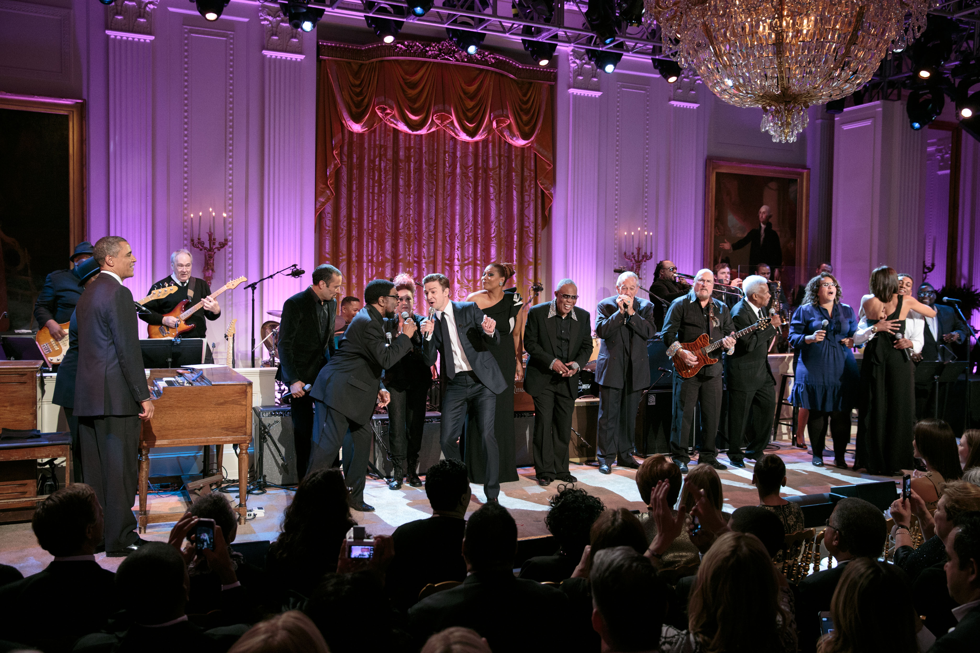 Justin Timberlake y Steve Cropper interpretando «(Sittin' On) The Dock of the Bay» en el concierto In Performance at the White House: Memphis Soul, realizado en el East Room de la Casa Blanca el 9 de abril de 2013.